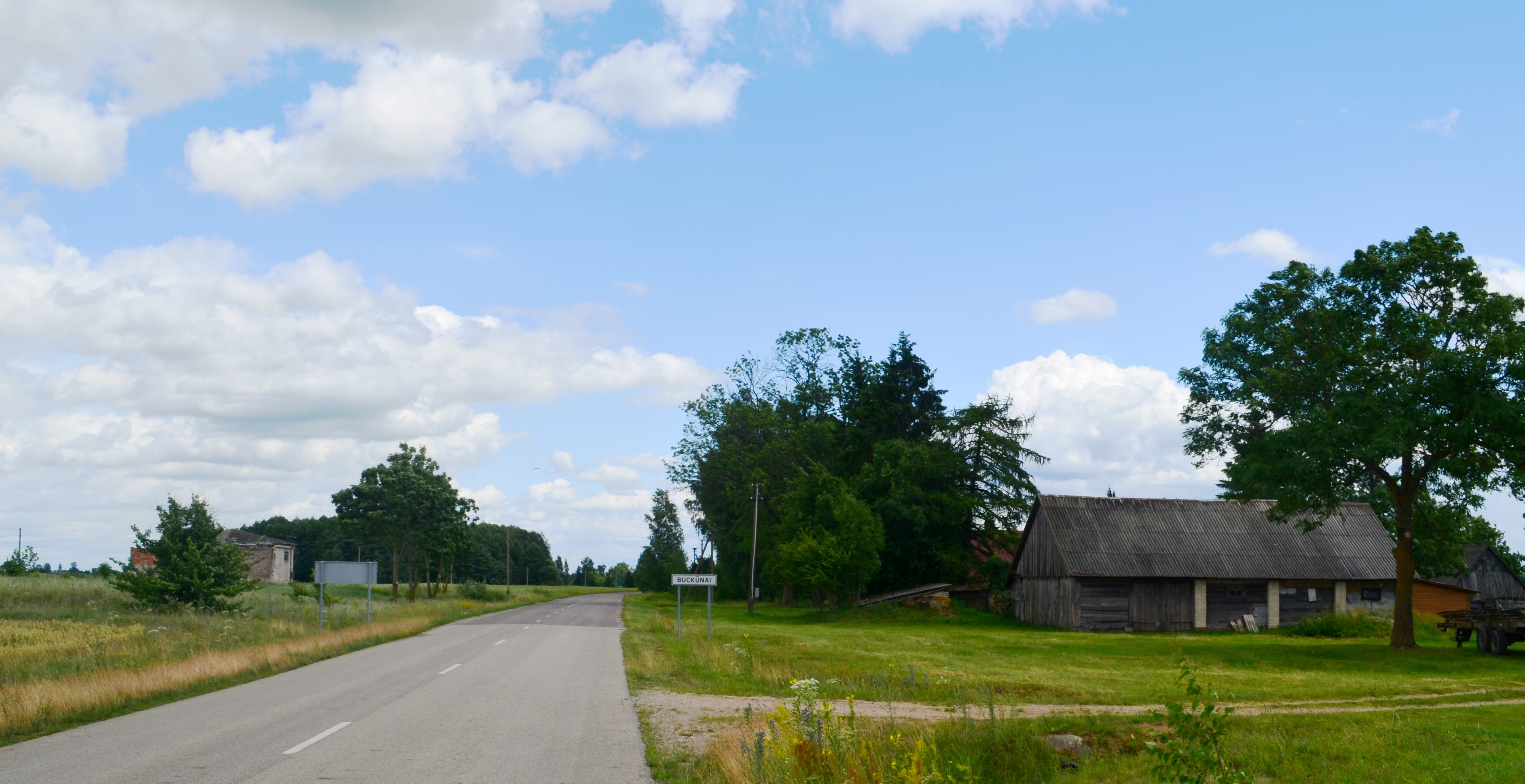 Buckūnai, Lazdijų raj.